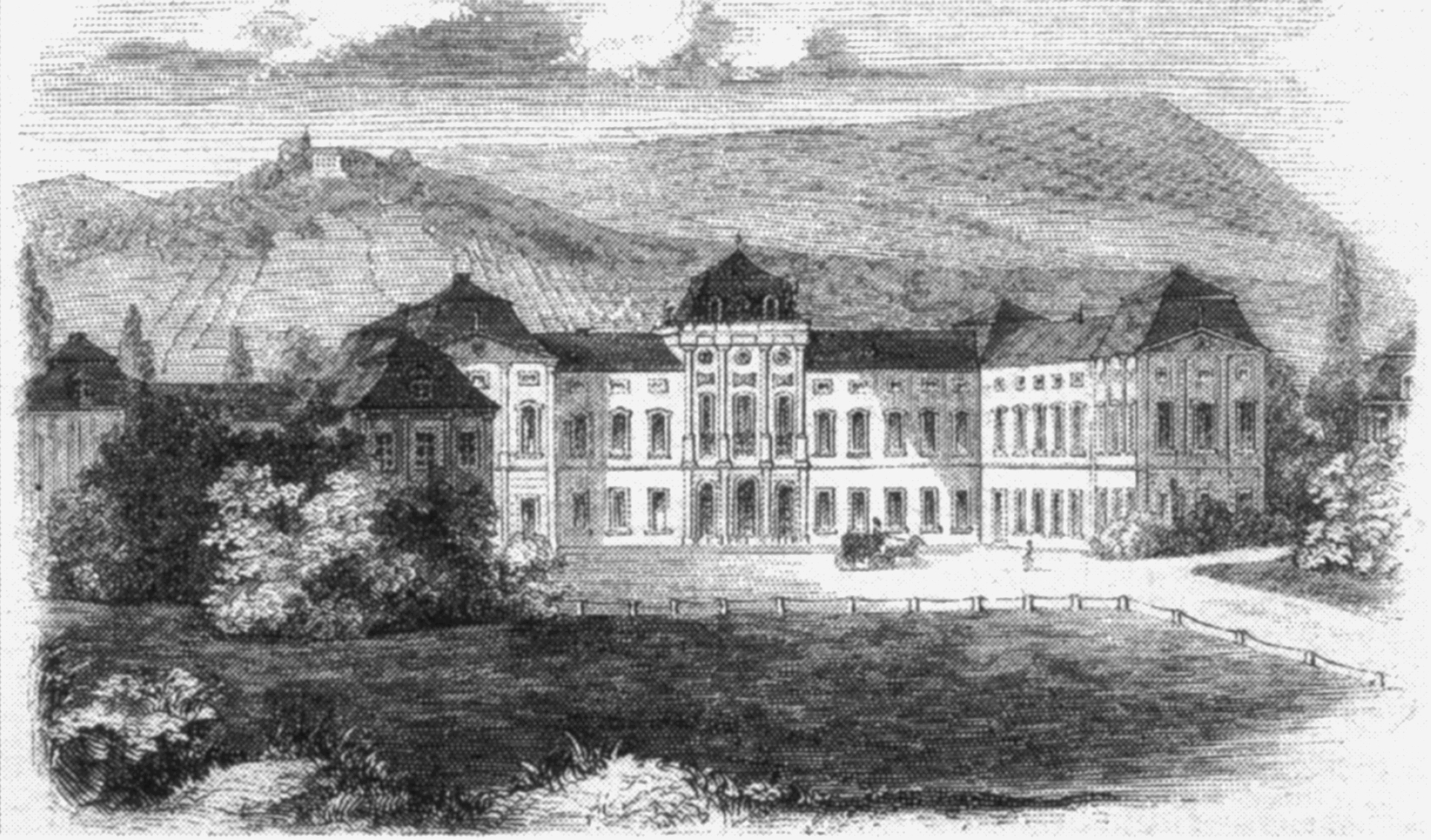 Schloss Kleinheubach, veröffentlicht in der "Illustrierten Zeitung"